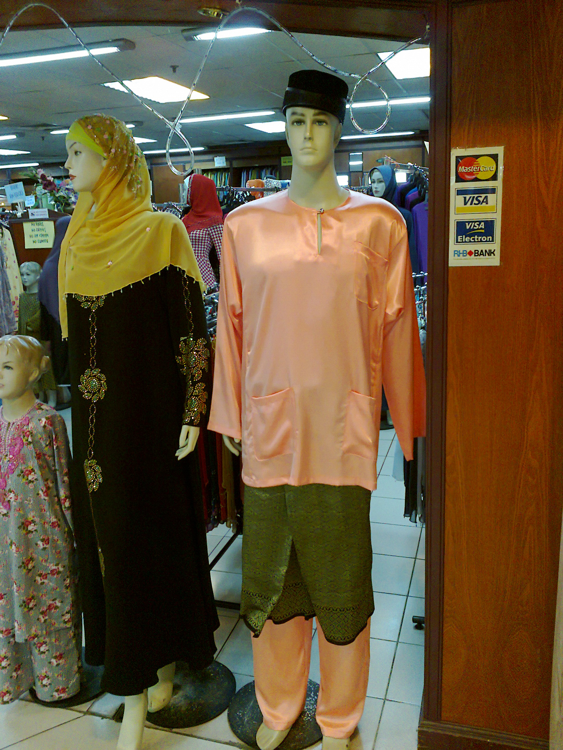 Rekaan baju Melayu Teluk Belanga.